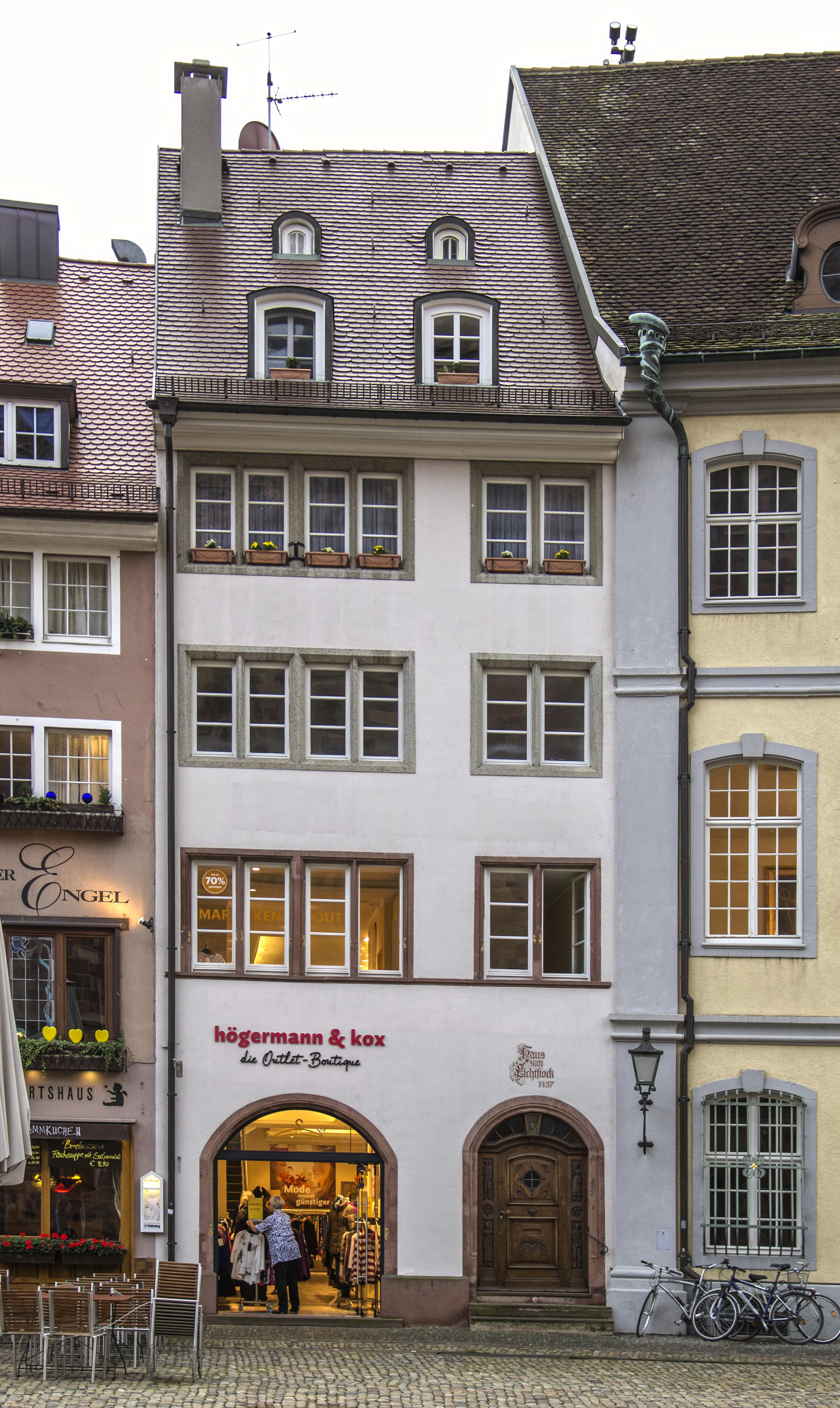 DFN Treffen am 12.09.2013 auf dem Freiburger Münsterplatz